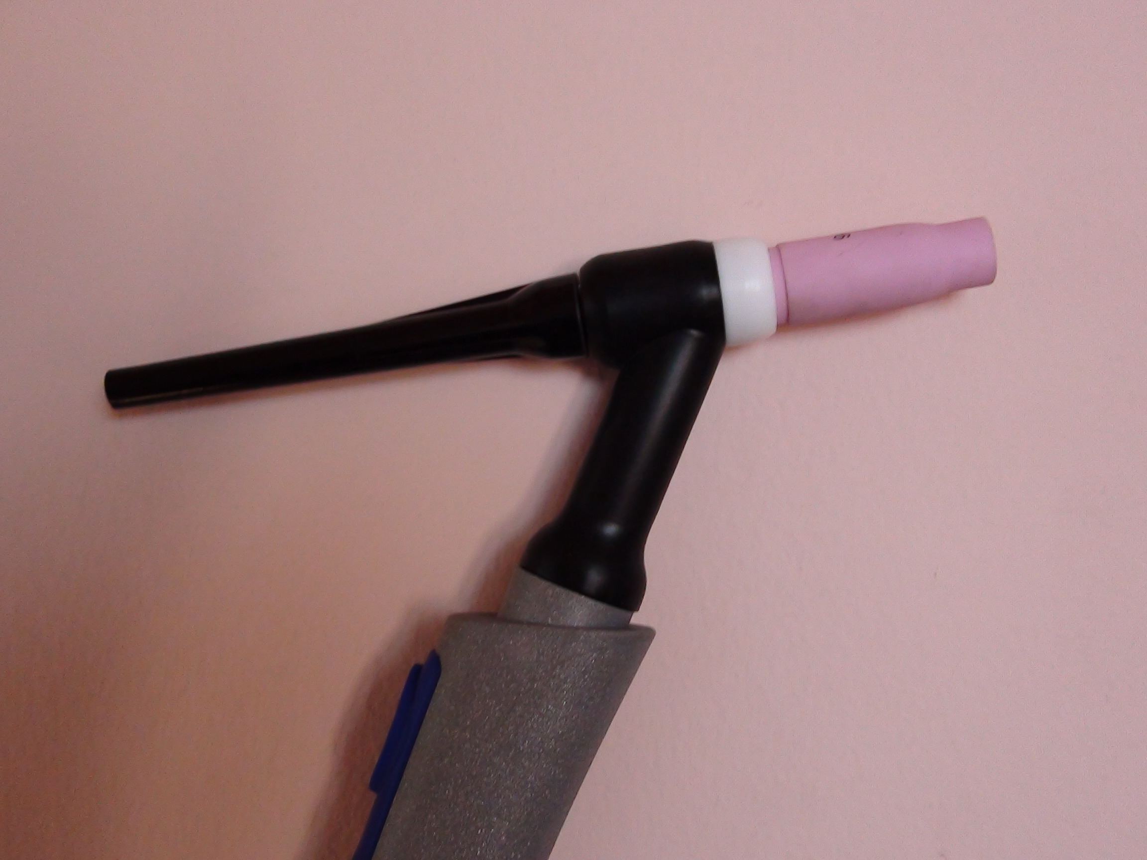 TIG gorilnik.